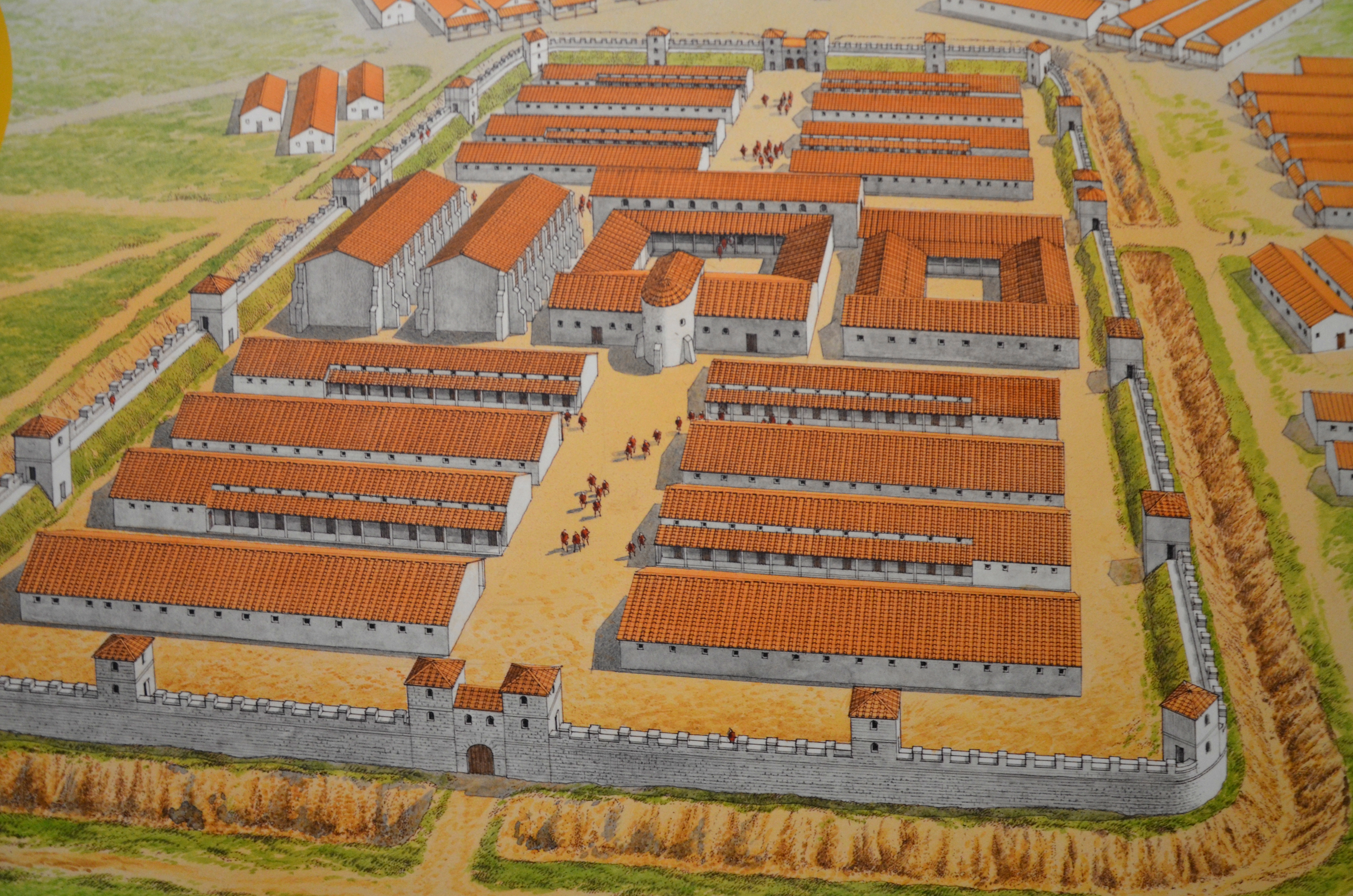 Rekonstruktion des Limeskastell Zugmantel in Deutschland, Taunusstein-Orlen im hessischen Rheingau-Taunus-Kreis, Zustand um 200 n.Chr., gez. von Brian Delf.